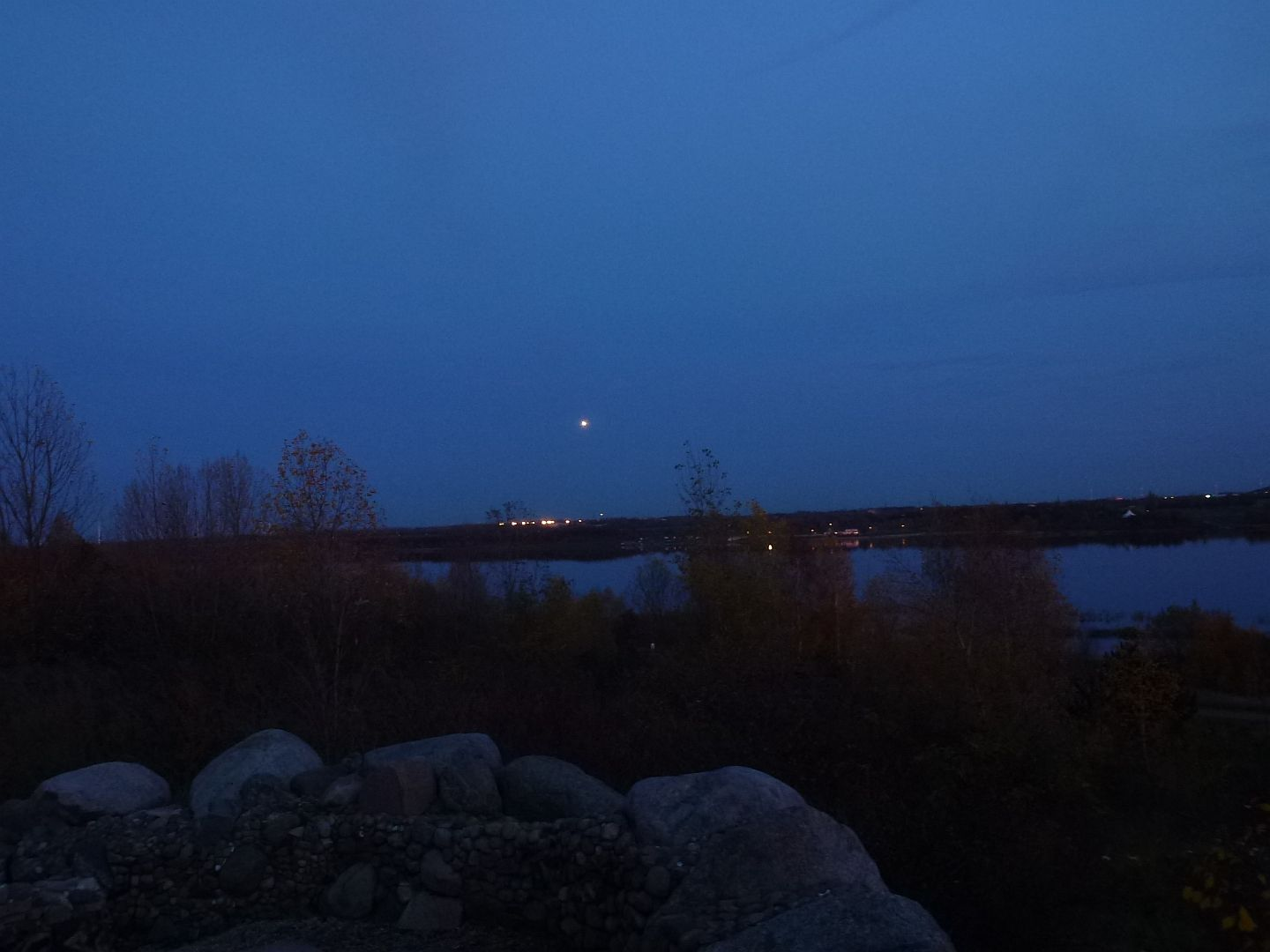 Flugzeug im Landeanflug über dem Schladitzer See